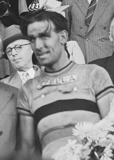 Tour de France, 2e etappe Reims-Brussel. Finish, Winnaar Roger Lambrecht (België) op tribune tijdens huldiging